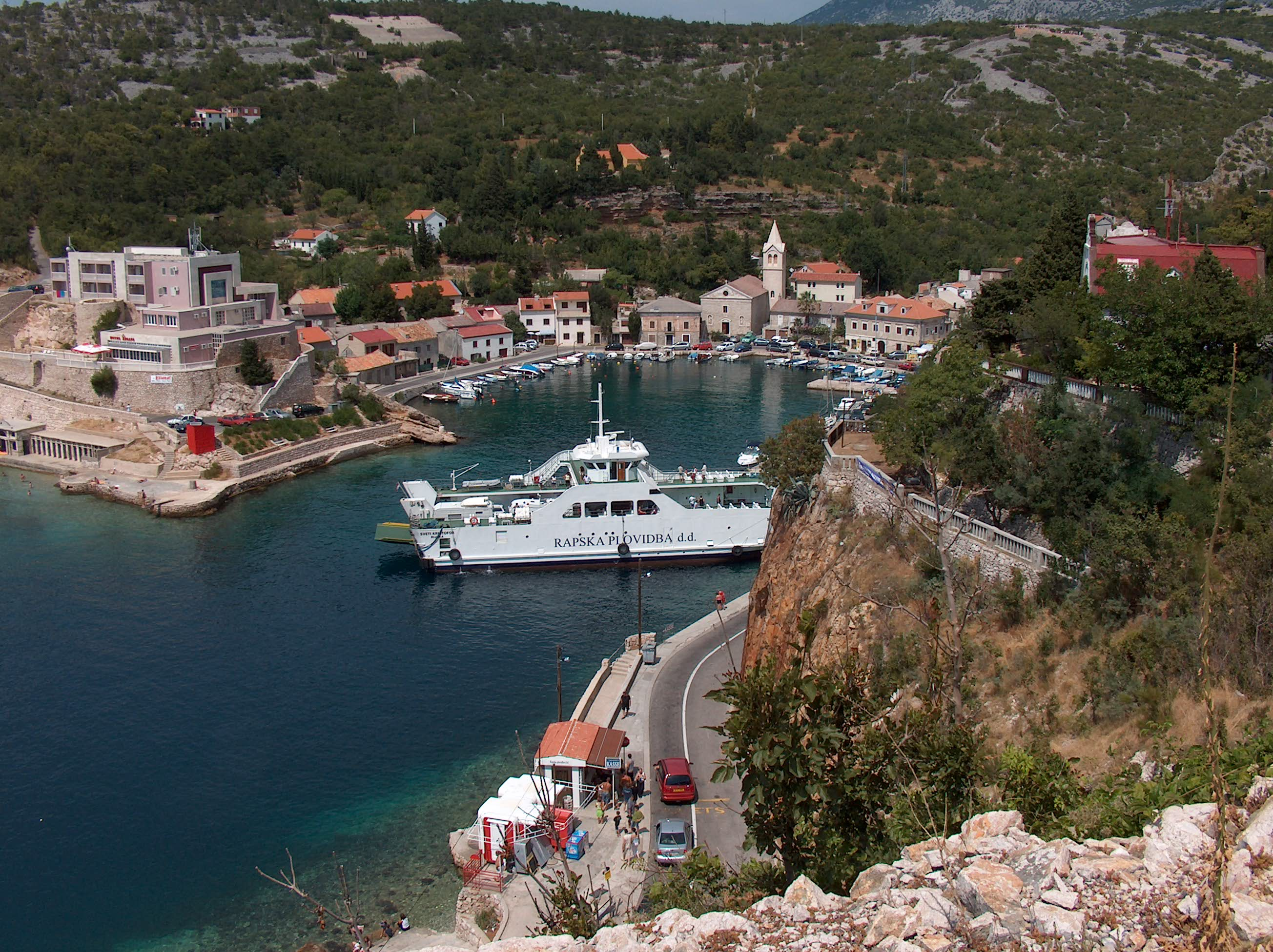 Jablanac village / Jablanac település